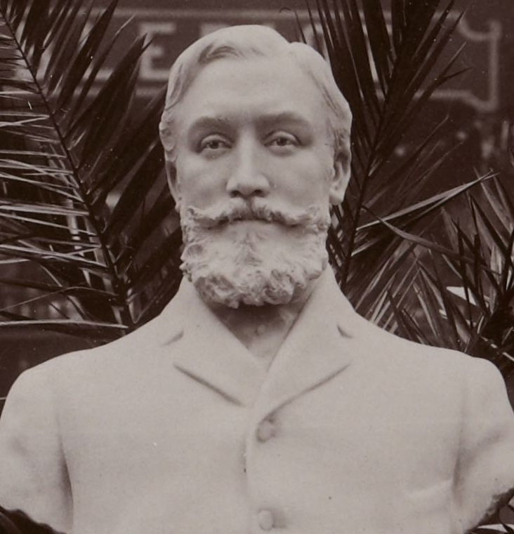 [Collection Jules Beau. Photographie sportive] : T. 24. Années 1903 et 1904 / Jules Beau : F. 34. [6e Salon, Grand-Palais, 10 - 25 décembre 1903]